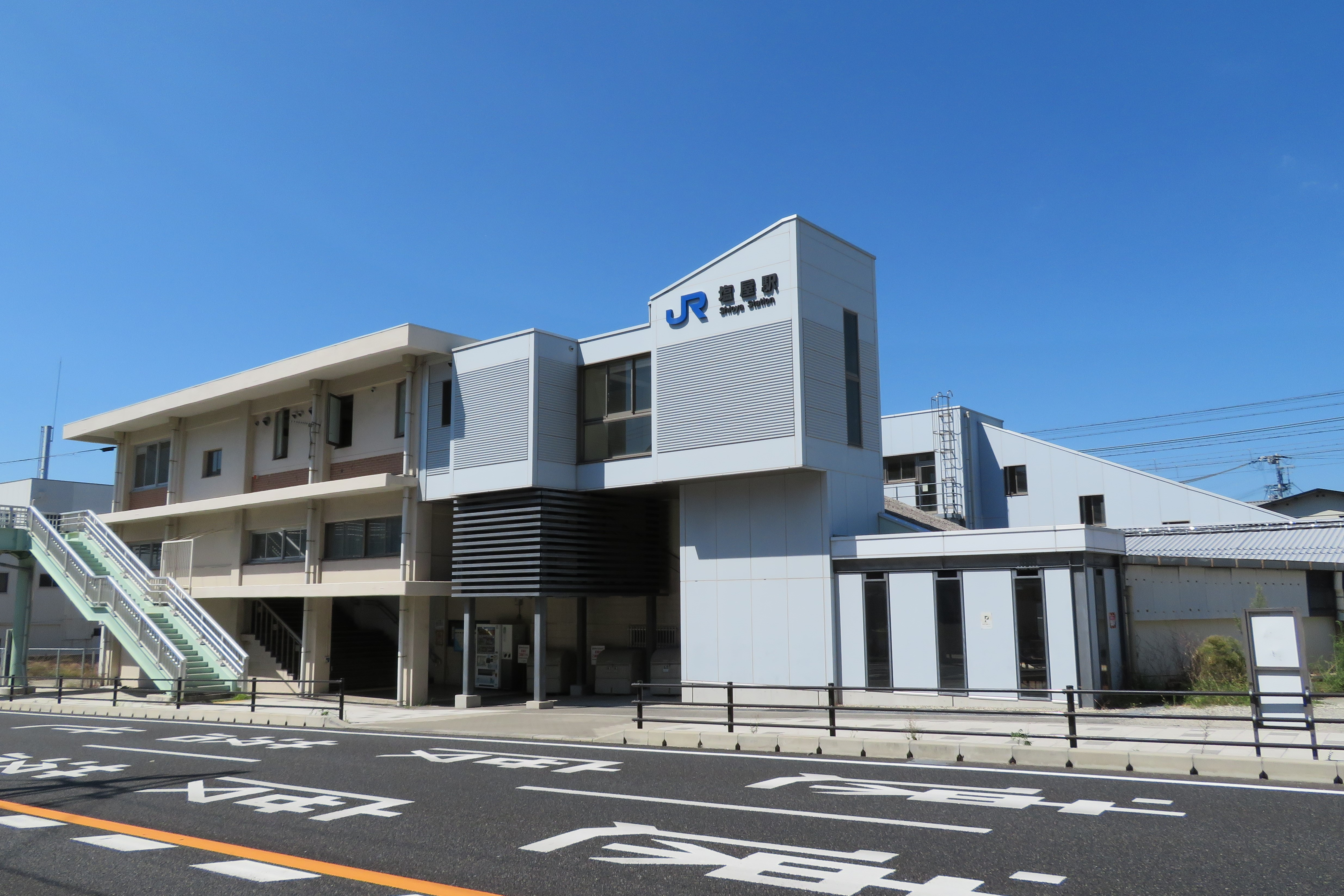 JR塩屋駅